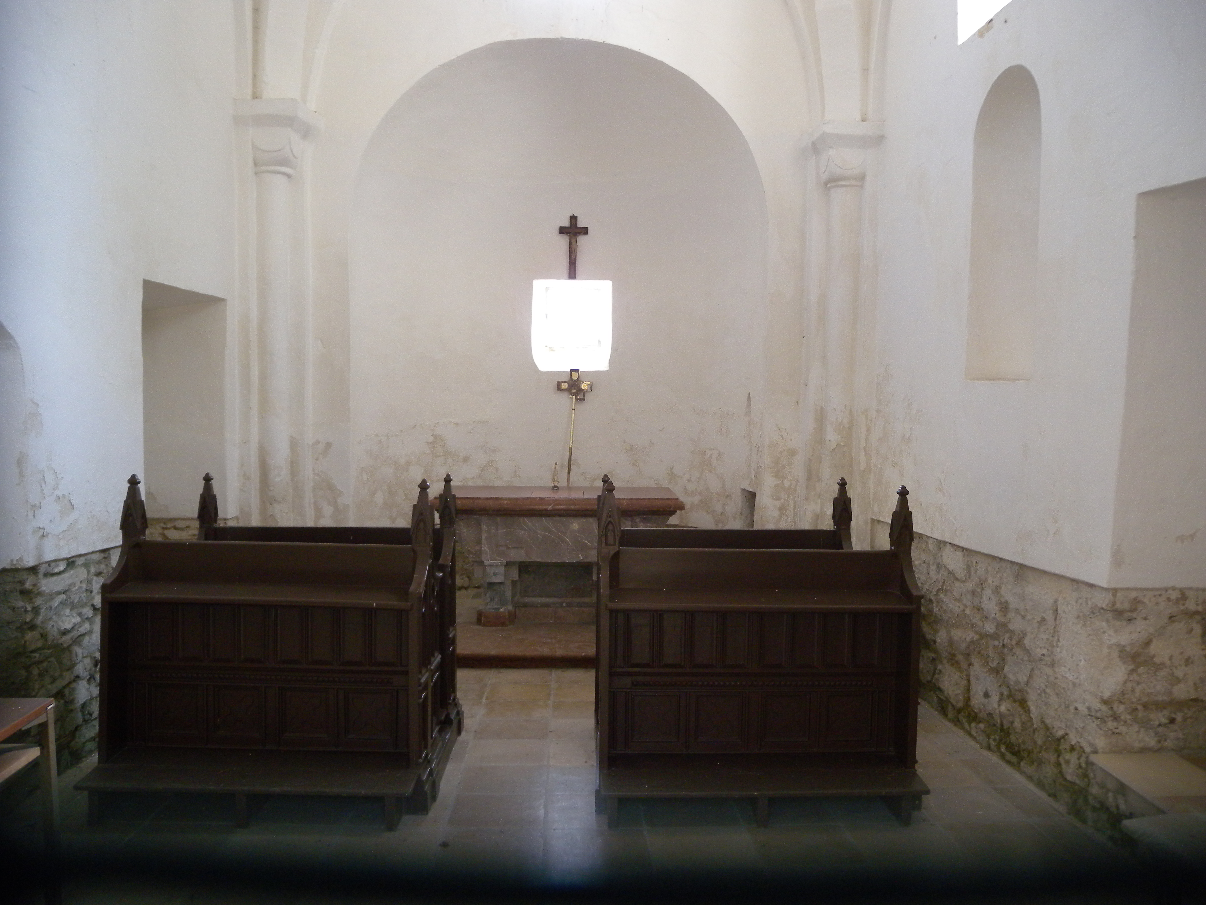 Blick in die Nikolaikapelle